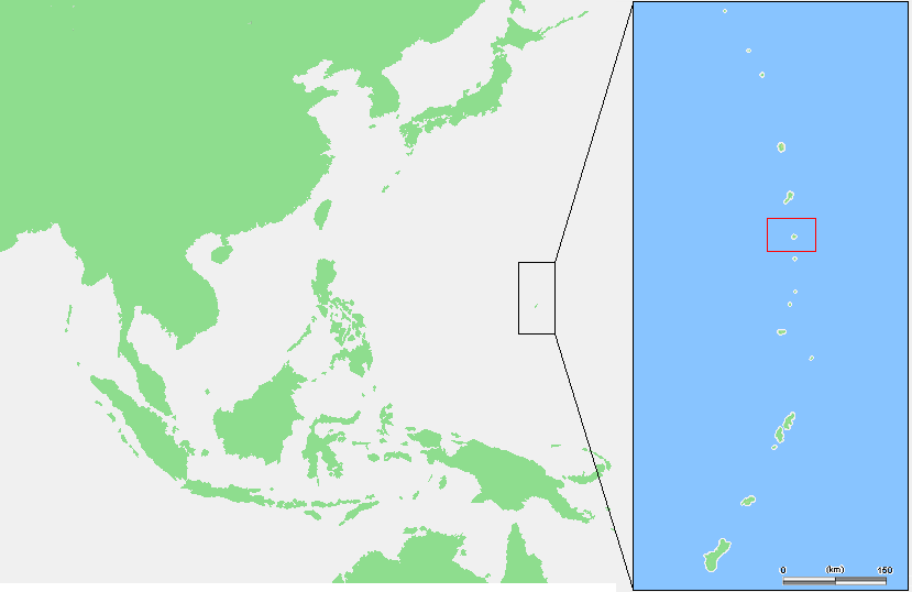 Mariana Islands - Alamagan.PNG